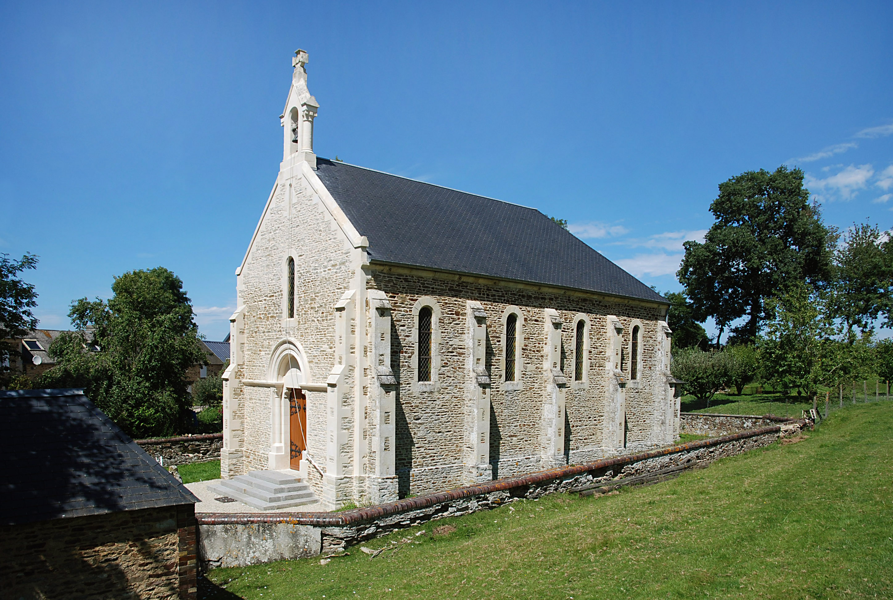 Livry (Calavados)